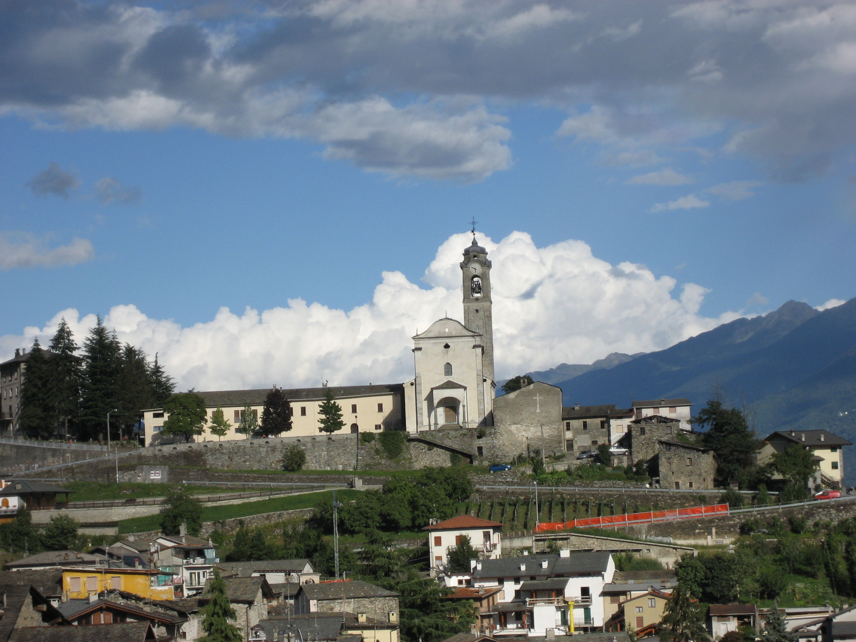 Foto scattata da me il 26/08/2006 Panorama di Poggiridenti con chiesa di San Fedele Licenza d'uso: pubblico dominio, rilascio tutti i diritti, sono l'autore